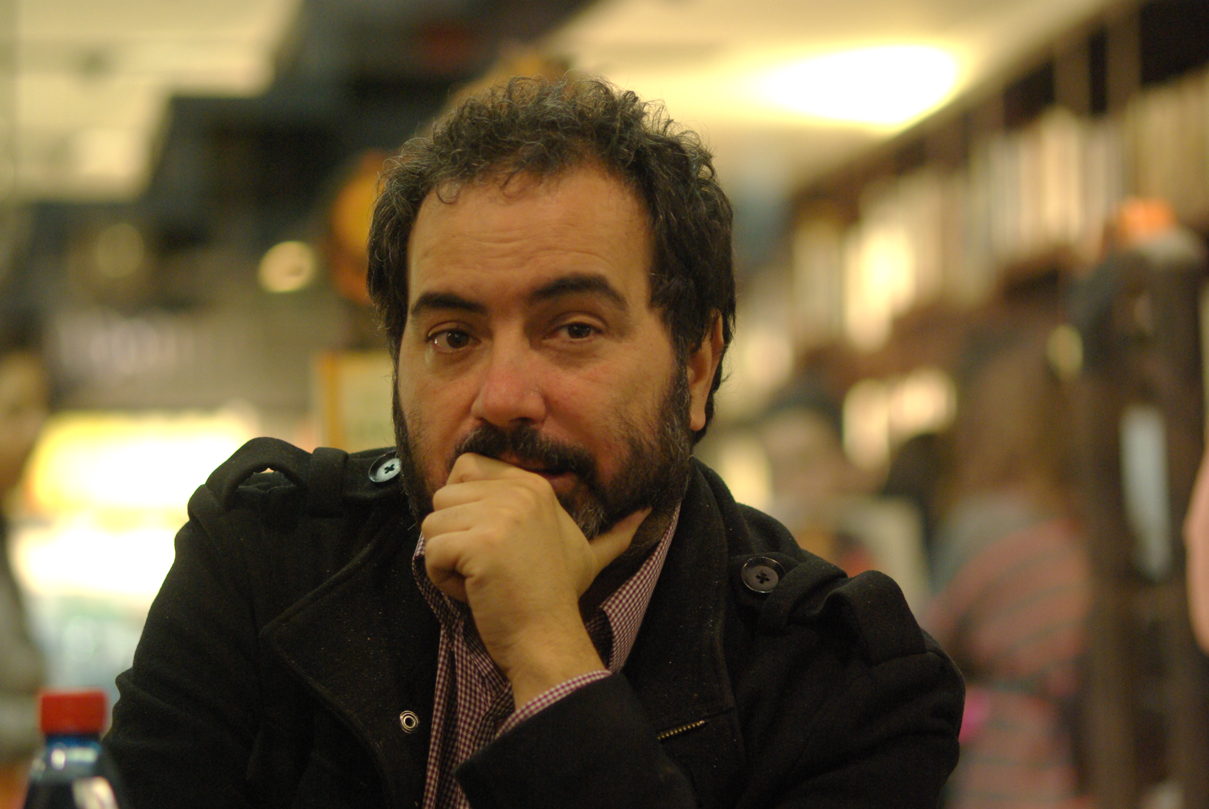 El escritor chileno Rafael Gumucio durante un diálogo con su colega Roberto Merino sobre el libro de Enrique Araya Las tres lunas, organizado por la libreria Nueva Altamira; 23 de abril de 2015